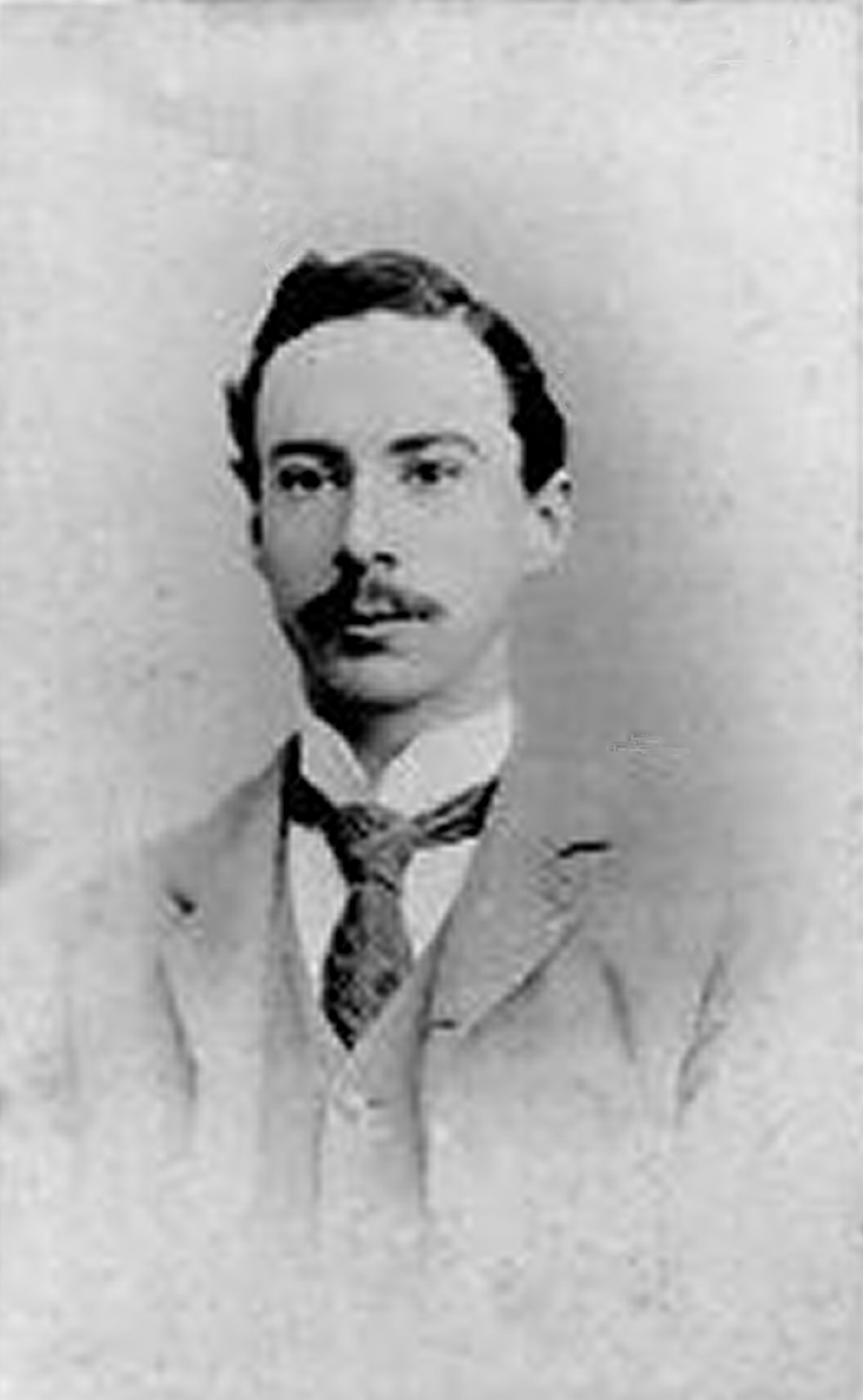 Bertrand Russell 1894